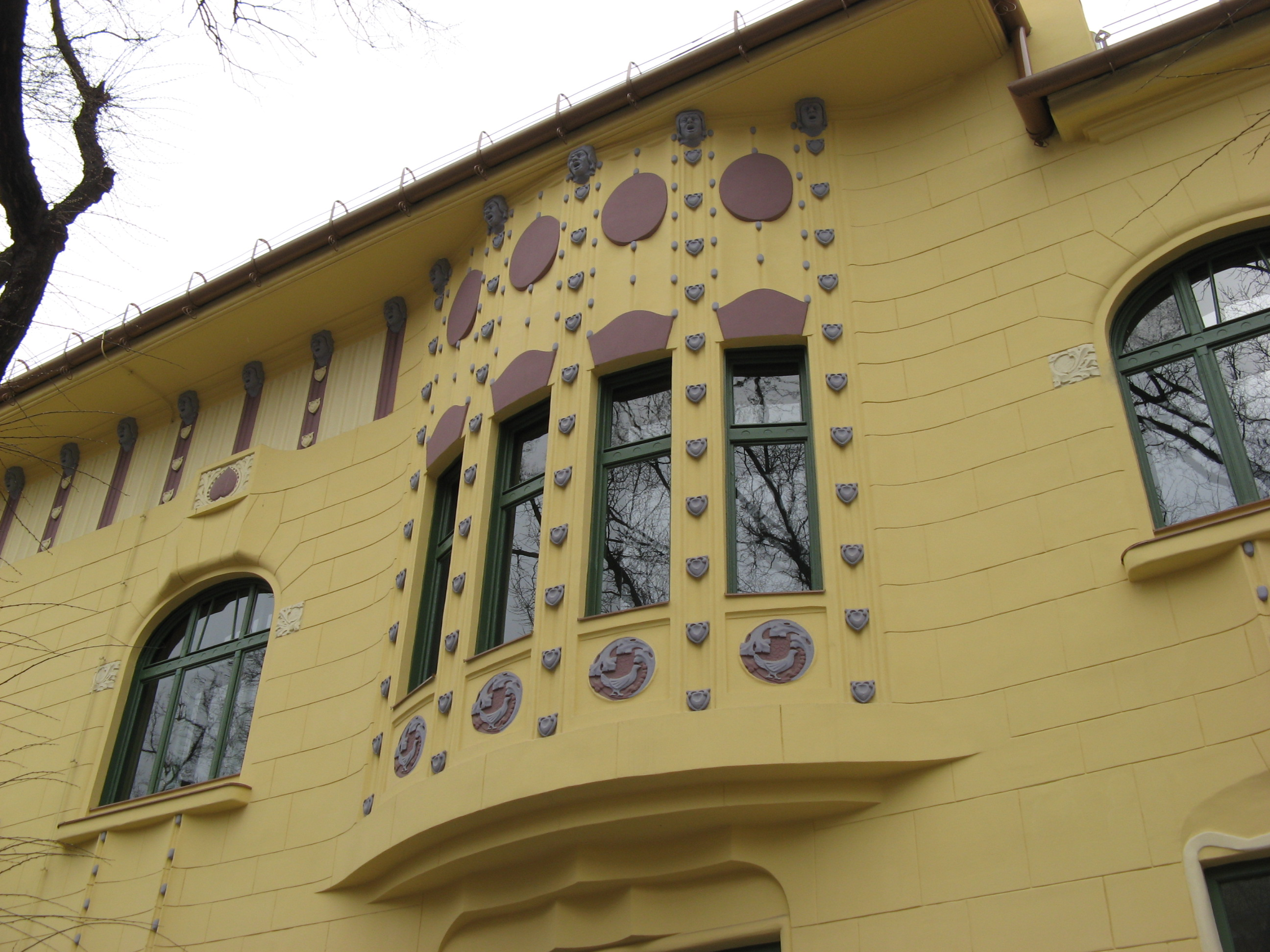 Зграда Градског музеја у Суботици. Саграђена је 1906. године као најамна кућа Микше Деметера, лекара и предузетника. Будимпештанске архитекте Јожеф и Ласло Ваго су је пројектовали инспирисани архитектуром сецесије Беча и Дармштата. Од Другог светског рата до 2007. године у згради се налазила штампарија Минерва.